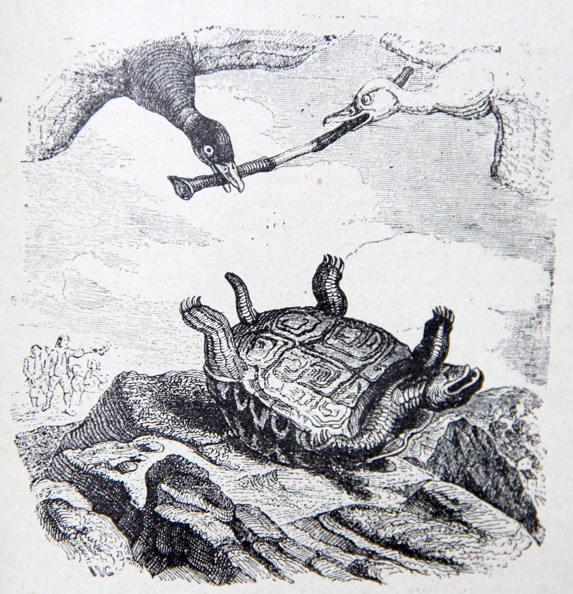 Illustrations des Fables de La Fontaine.